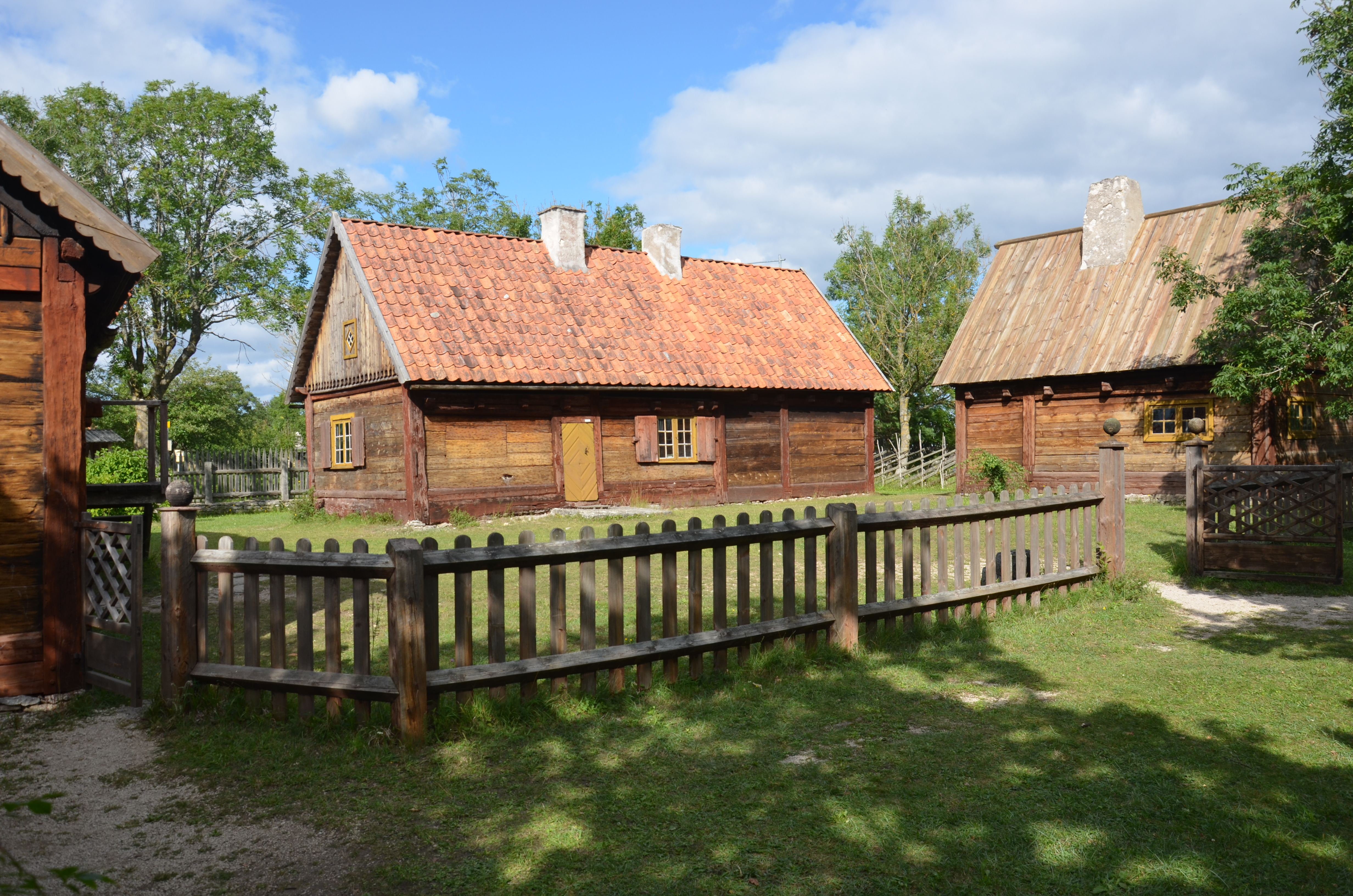 Bunge museum, Bunge, Gotland